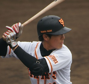 ジャイアンツ和田選手